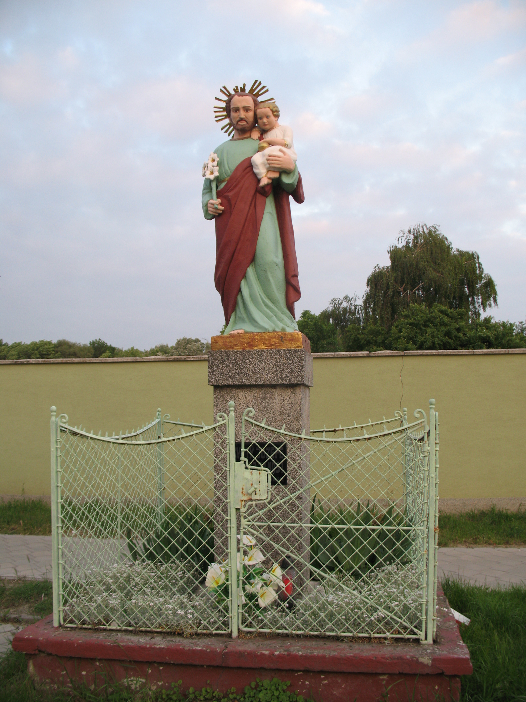 Vágkeresztúr